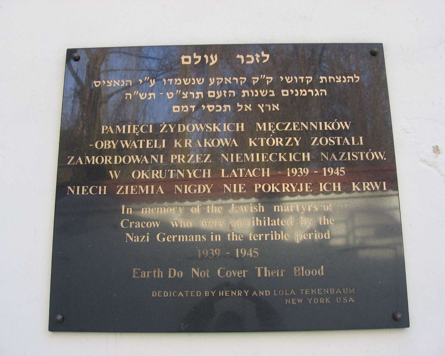 Synagoga Remuh w Krakowie Author: Wikipedysta:Birczanin